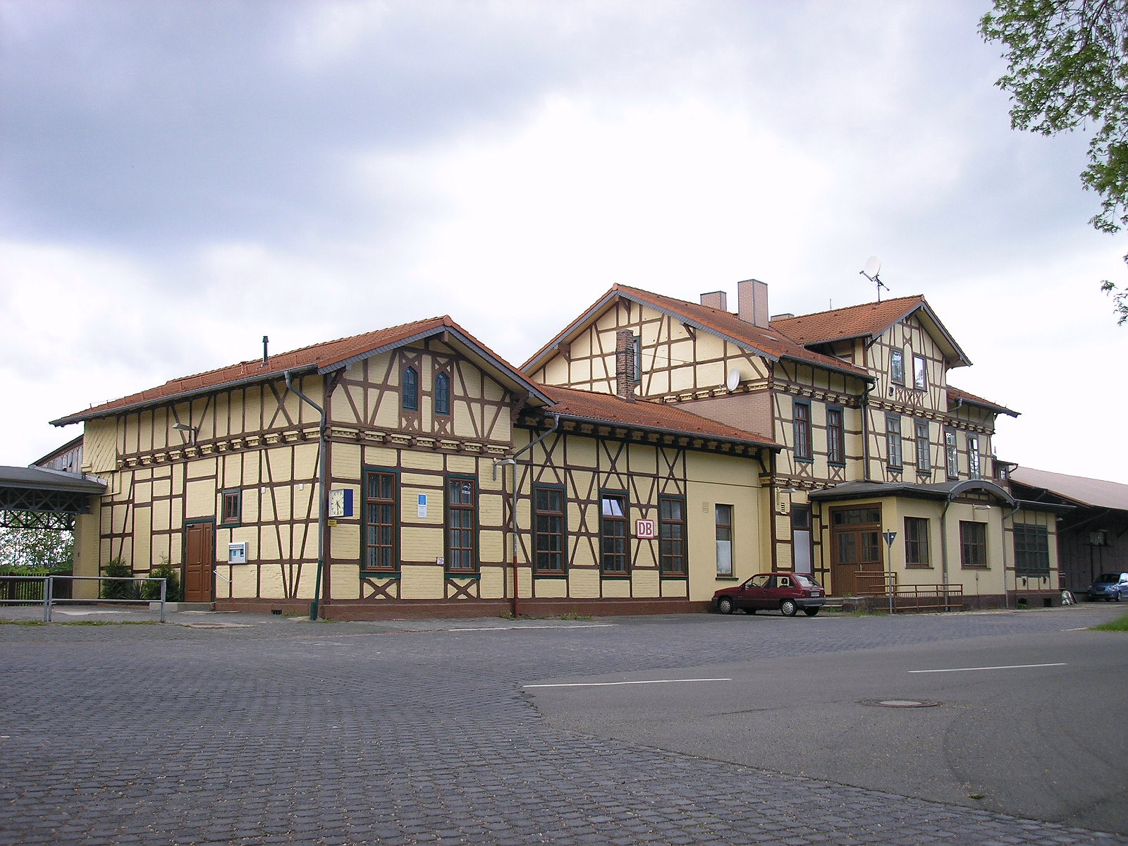 Der Bahnhof von Ohrdruf (Landkreis Gotha, Thüringen).